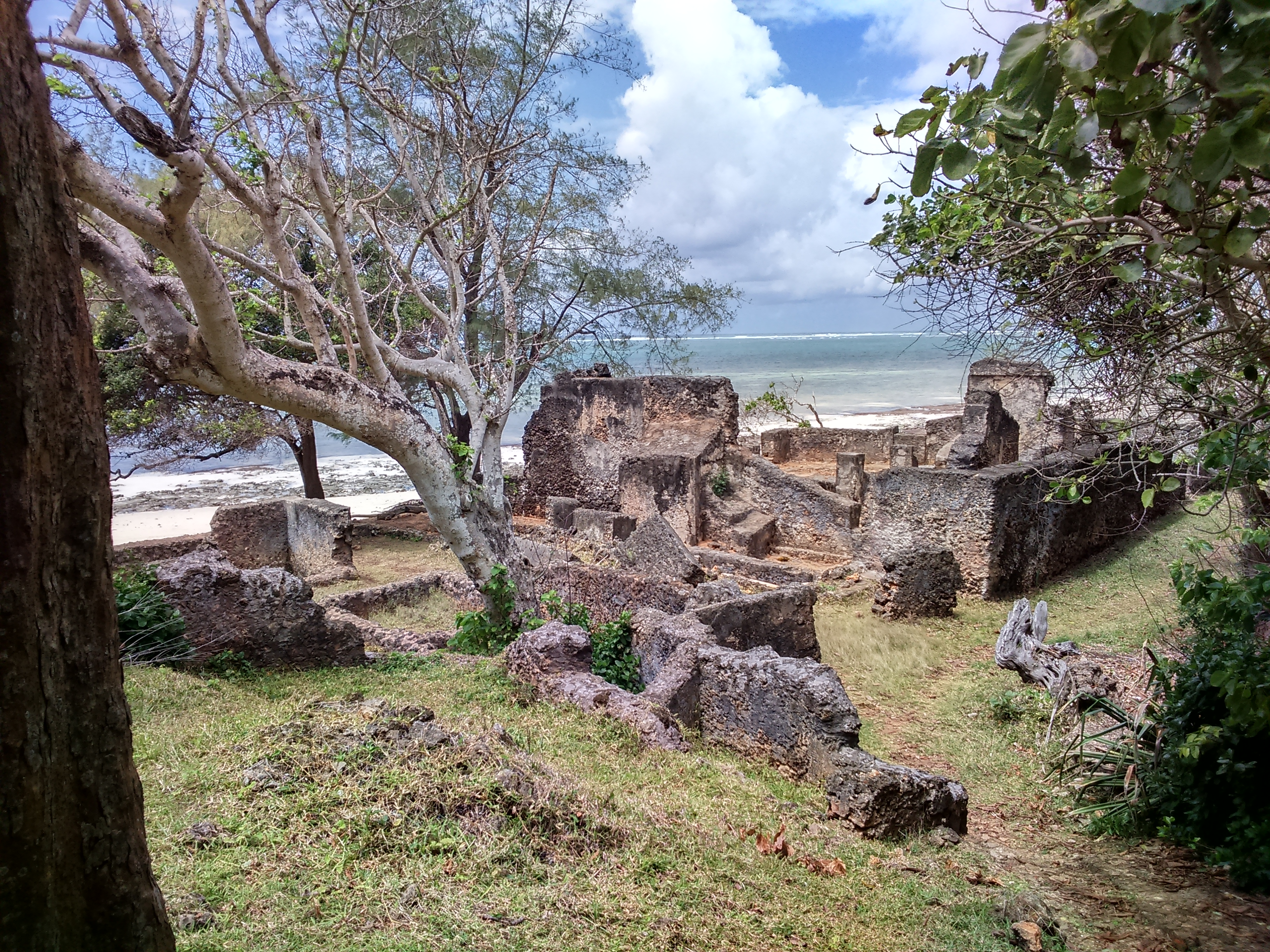 Mosquée de la plage